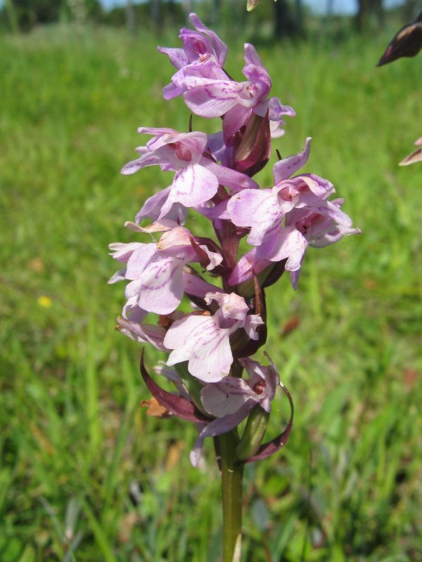 Traunsteins Knabenkraut Dactylorhiza traunsteineri, Müritz-Gebiet, aus einem angepflanzten Bestand